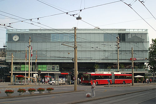 Fassade des Berner Hauptbahnhofs